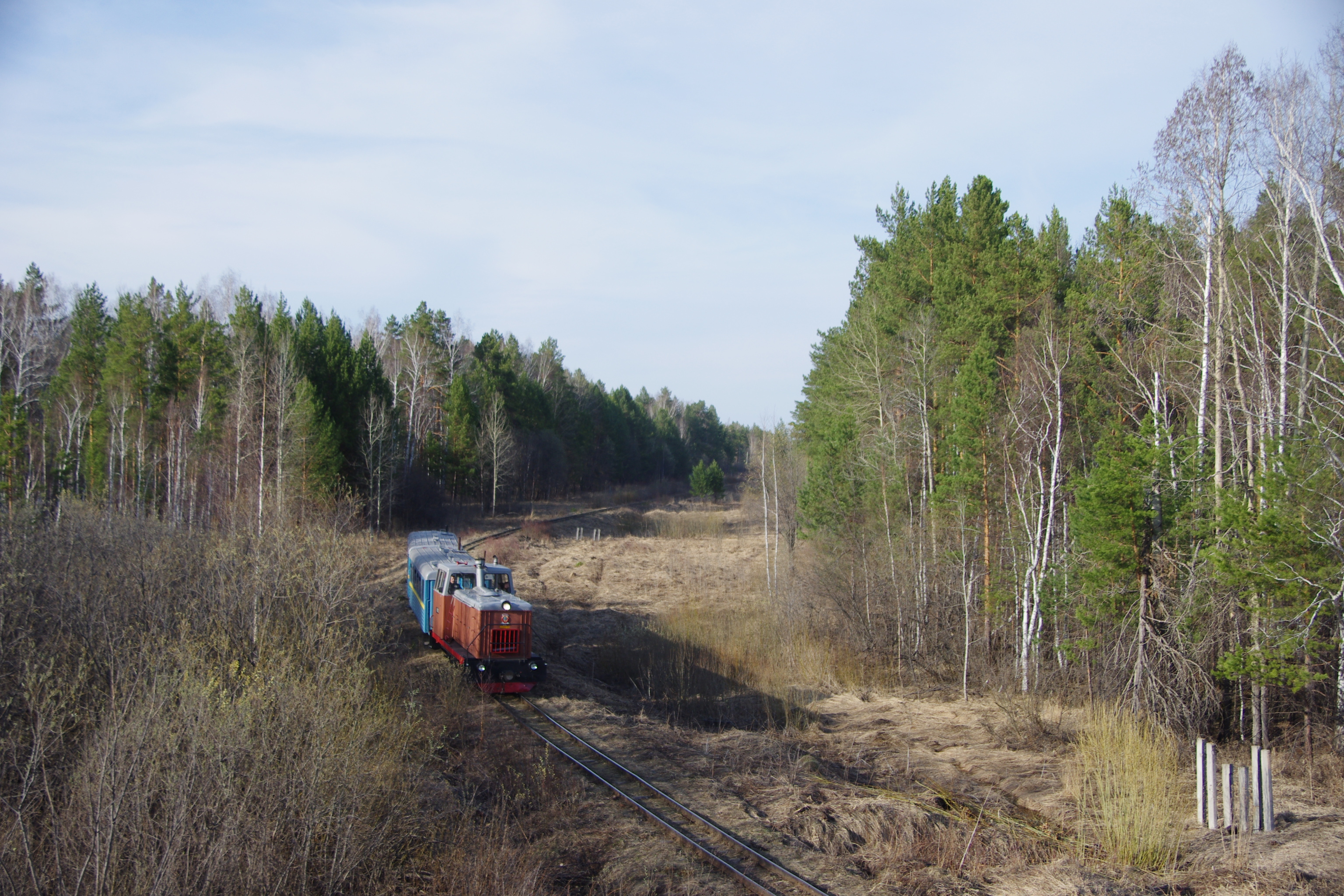 Экскурсионный поезд Алапаевск - Санкино. 2-3 мая 2014 г. Организован проектом "Поезд Напрокат".